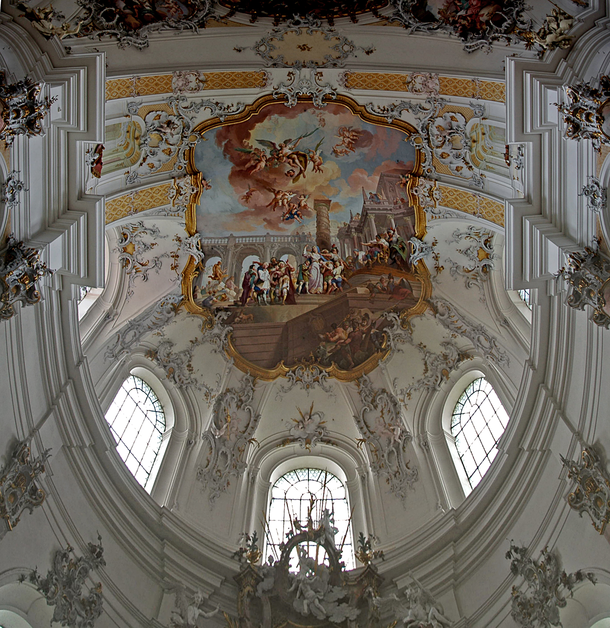 Basilika Ottobeuren - östliches Querhaus - Deckenfresko